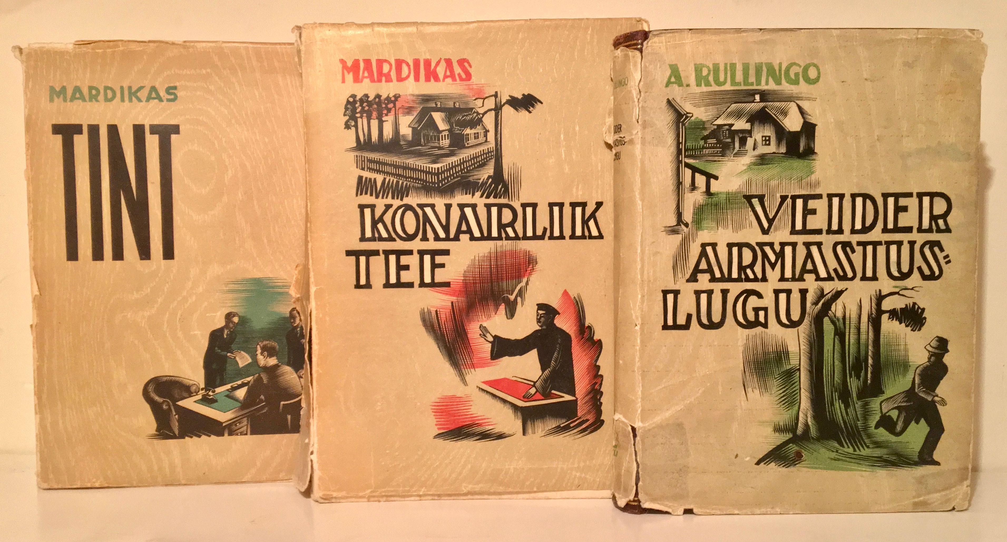 Esikaaned